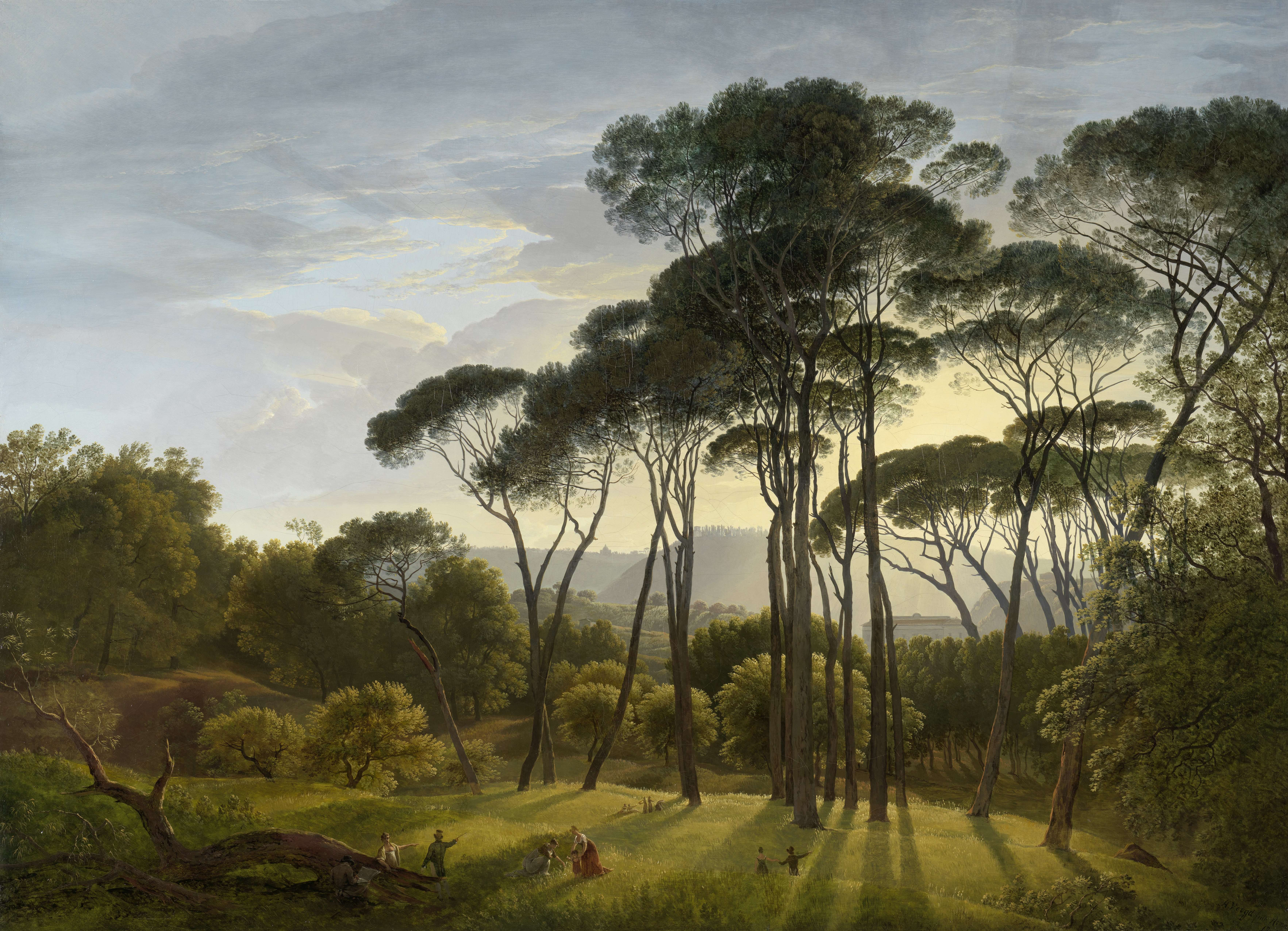 Paysage italien avec pins, d'Hendrik Voogd.